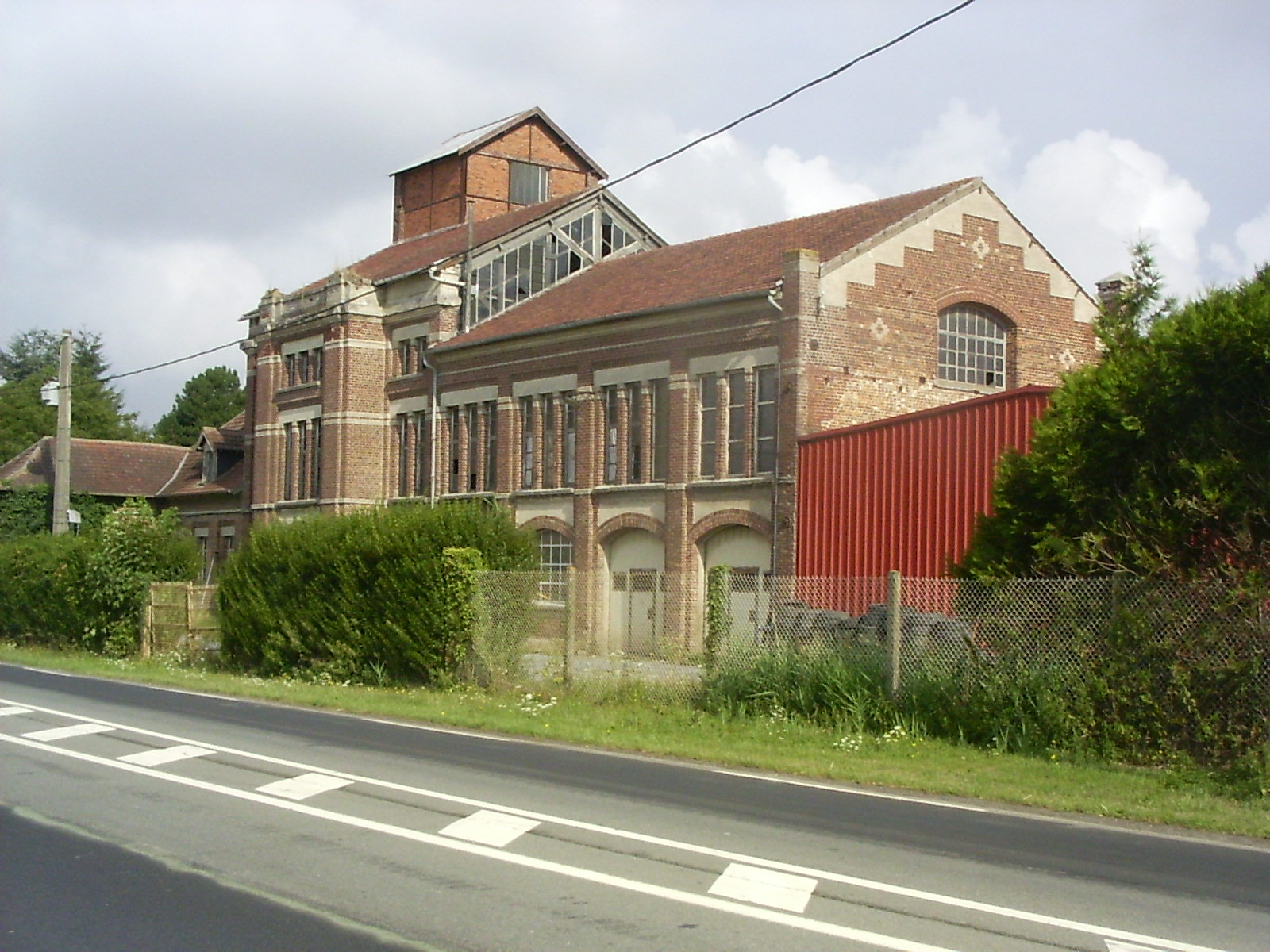 Hombleux, industrieëel erfgoed